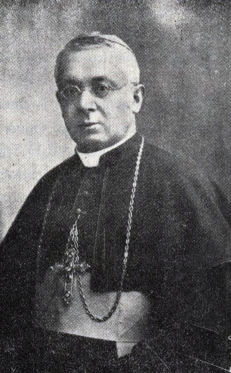 Augusto Curi (Servigliano, 15 agosto 1870 – Bari, 28 marzo 1933), arcivescovo cattolico italiano.